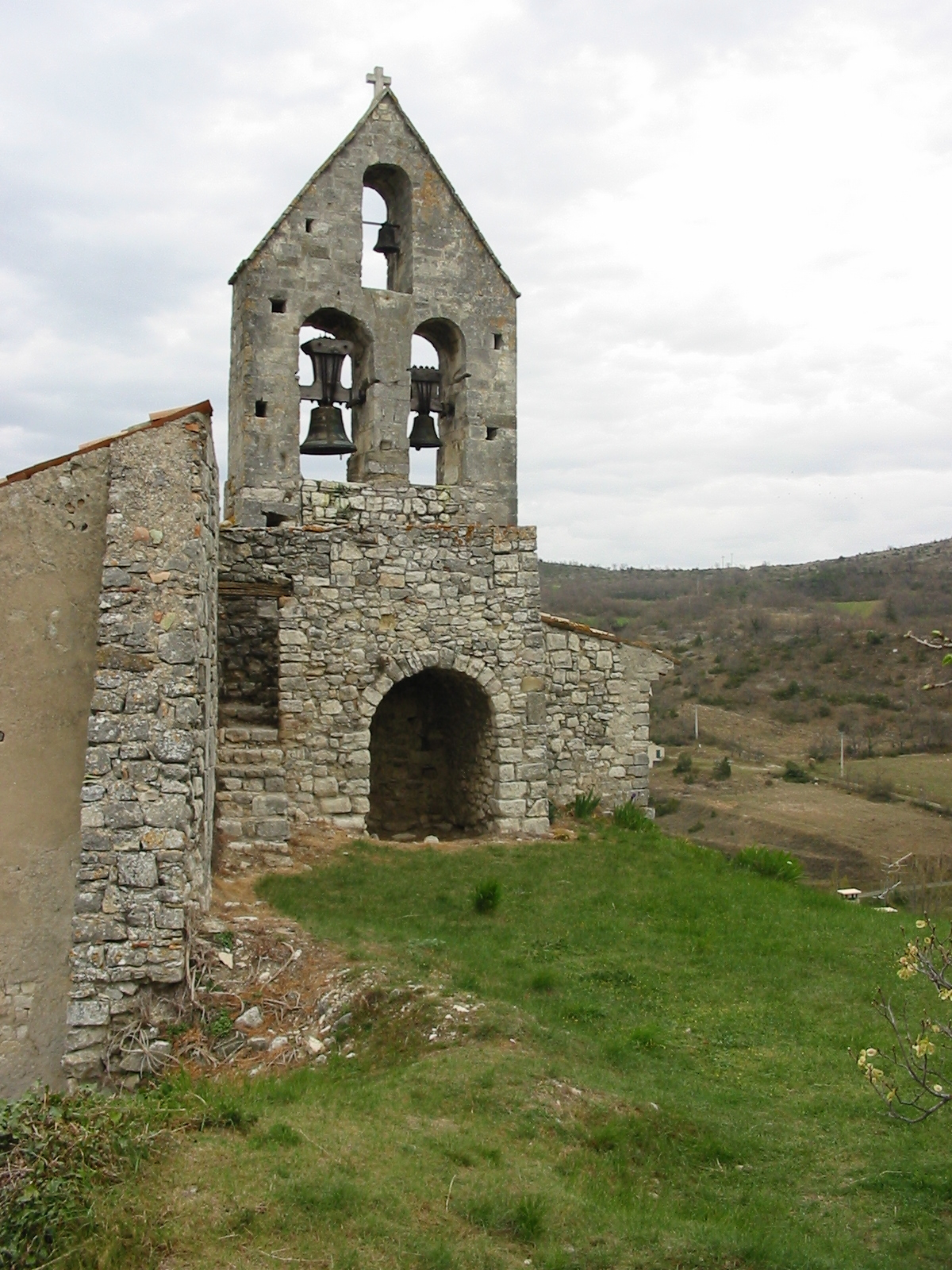 Clocher de l'église de Villemus. Photographie de Malost.